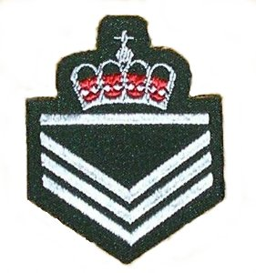 Stabssersjant: Distinksjon for stabssersjant i Luftforsvaret.